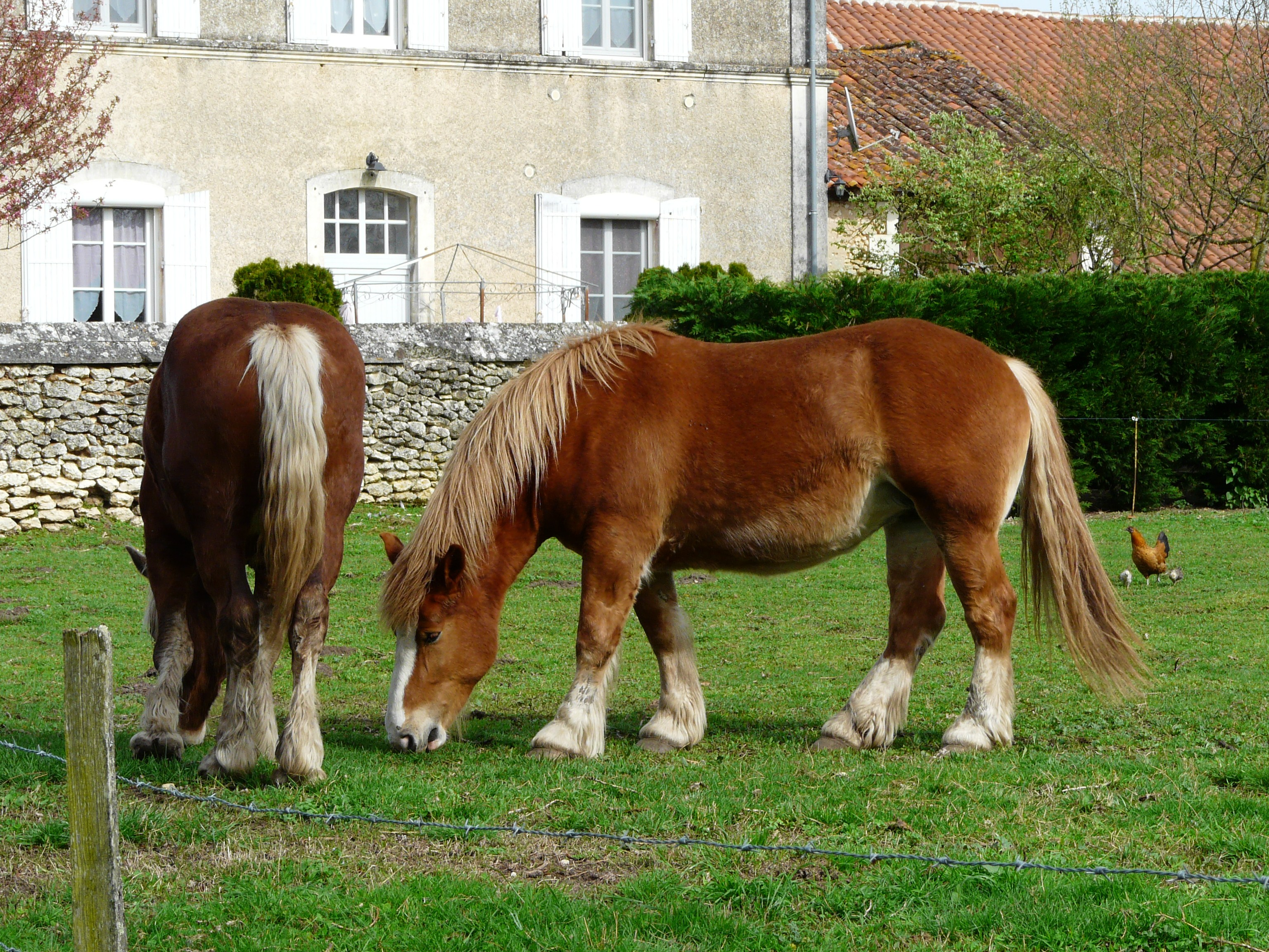 Chevaux de trait breton en Dordogne, France.